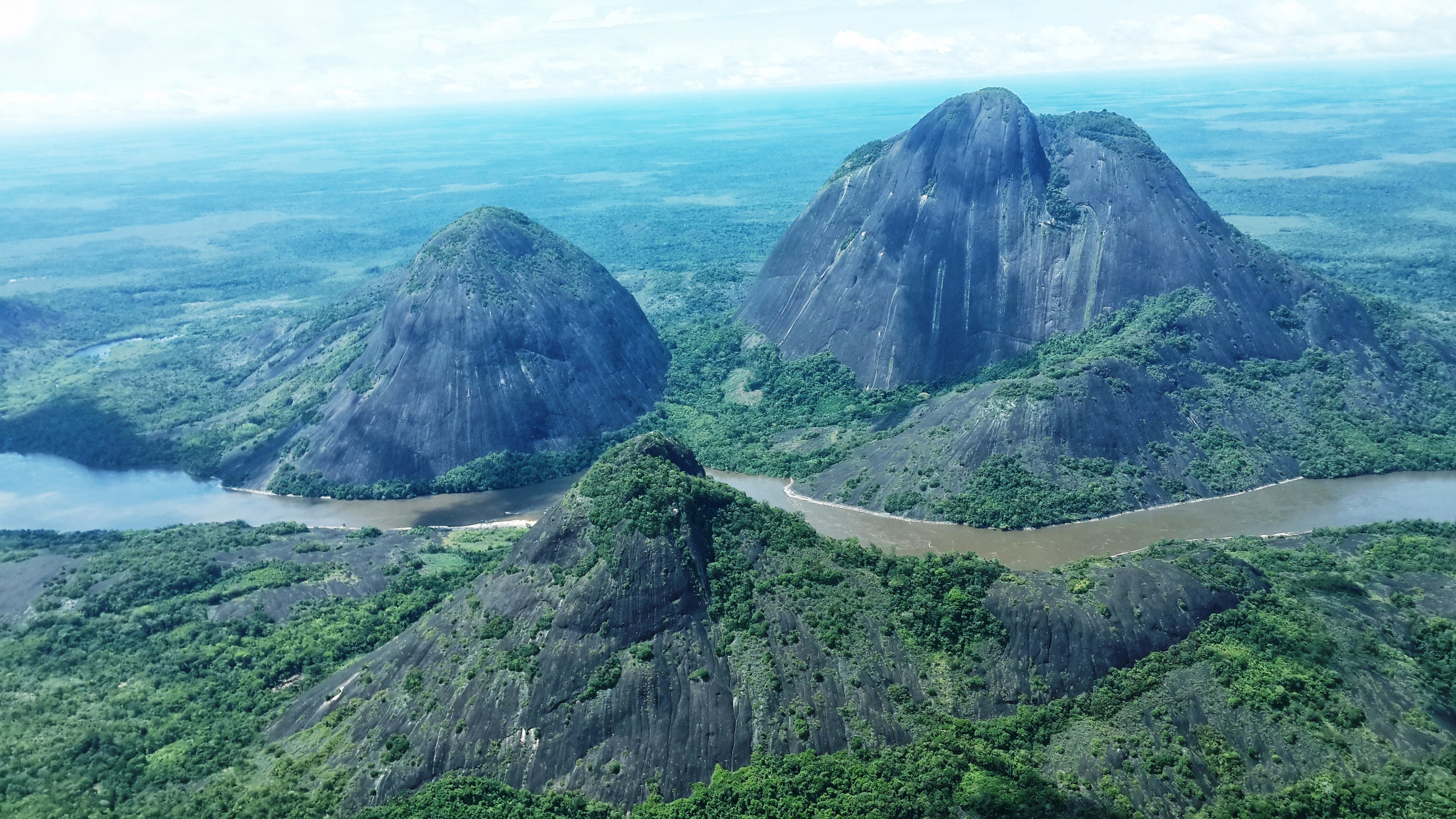 Cerros Mavecure, Inirida.